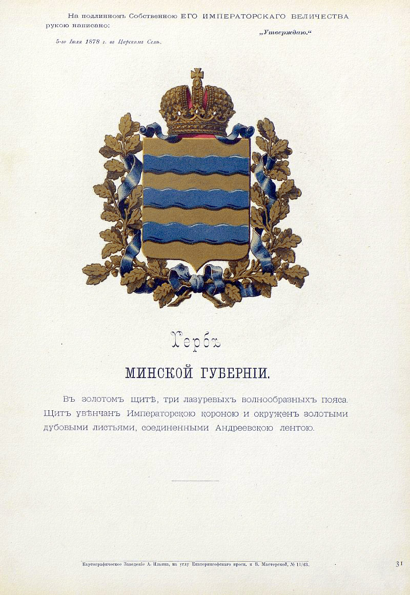 Official Russian Empire coat of arms Minsk Governorate. Герб Российской Империи Минской губернии с официальным описанием в Гербовнике Бенке. Утверждён Императором Всероссийским Александром Вторым.